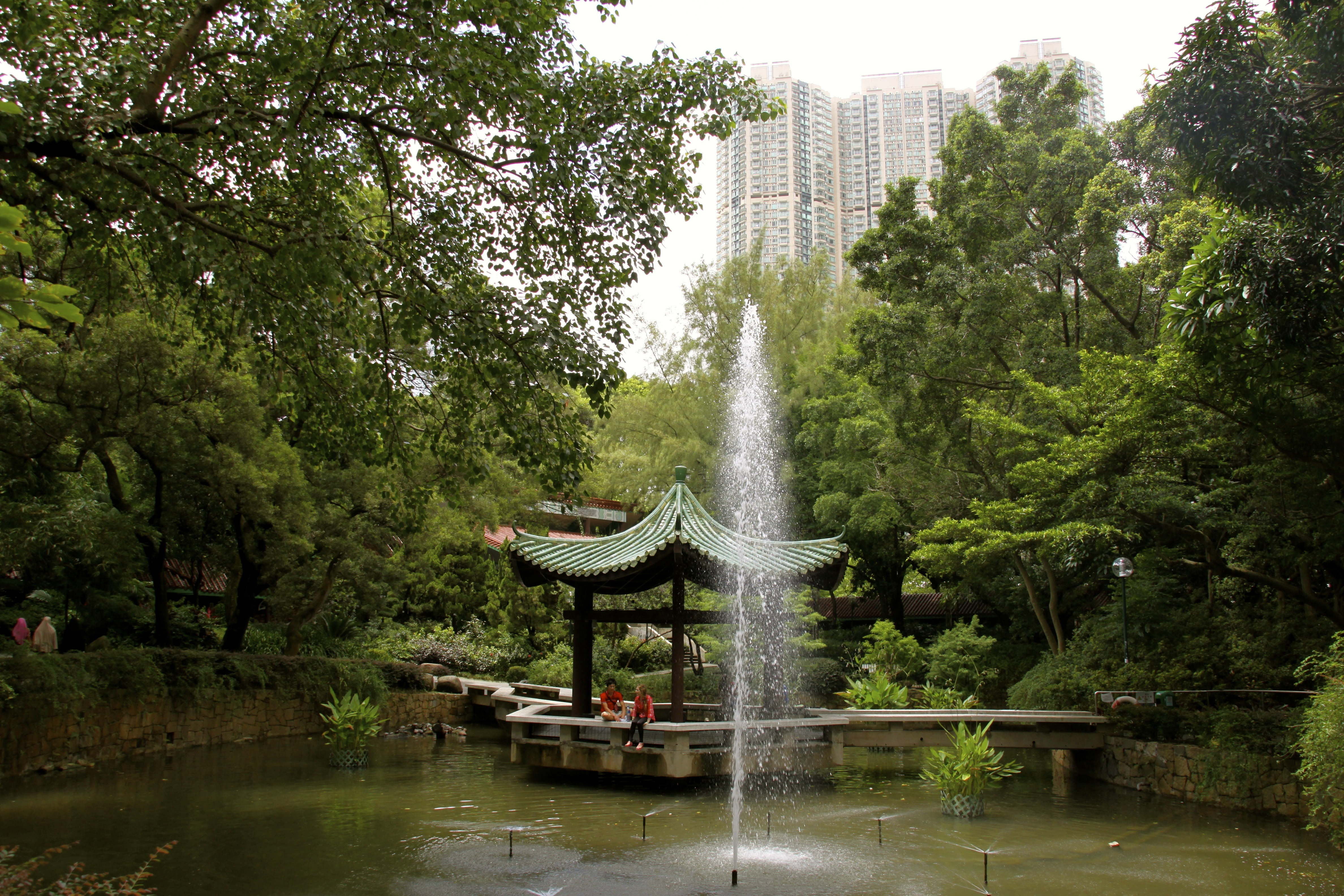 Kowloon Park